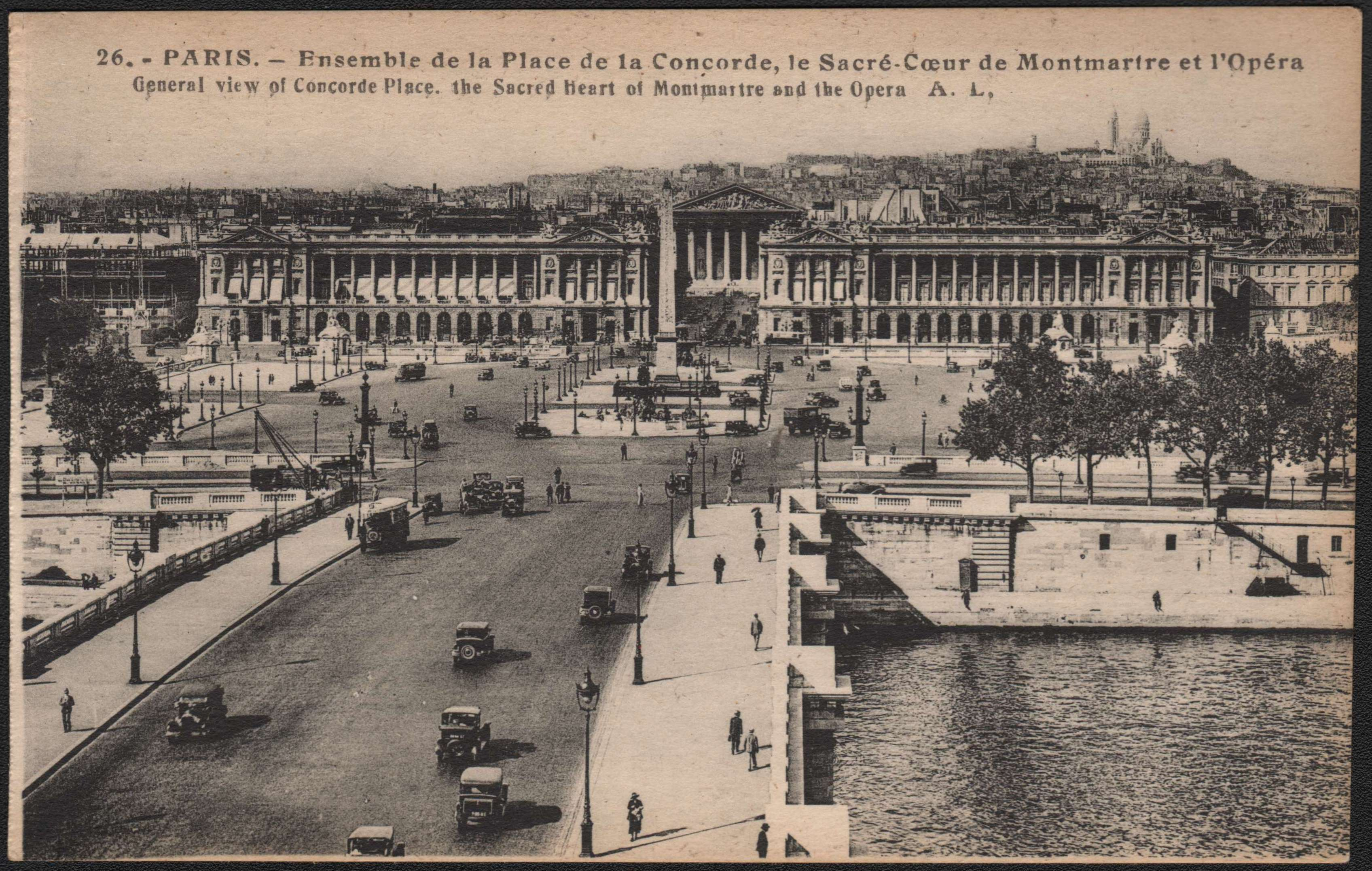 26. Paris - Place de la Concorde - A. Loconte